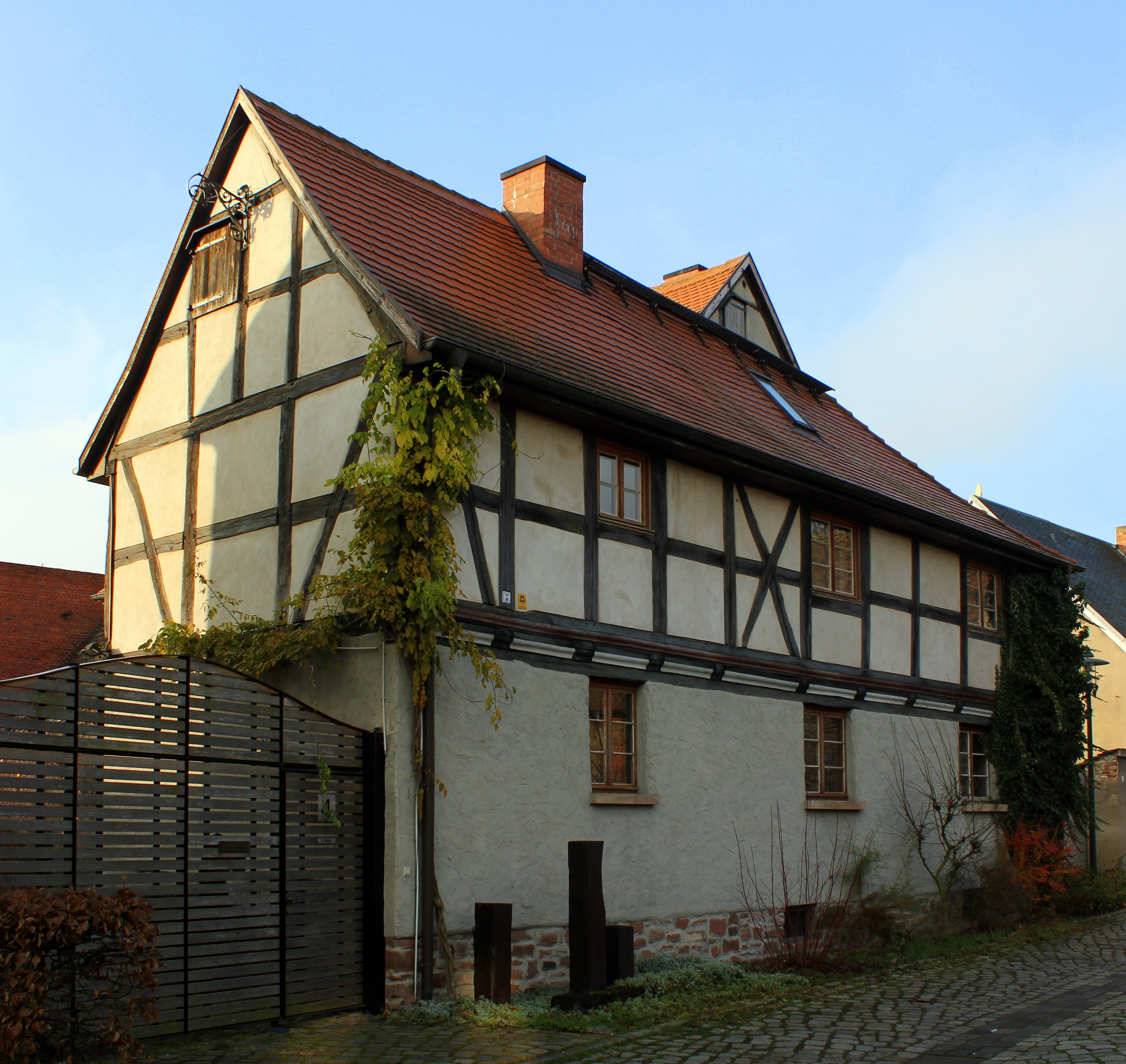 Wohnhaus, Alte Dorfstraße 4, Meitzendorf